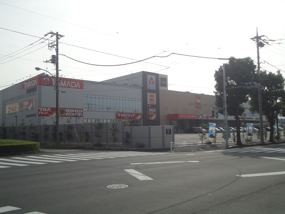 フォレオ青梅：東京都にある複合店舗の一種。